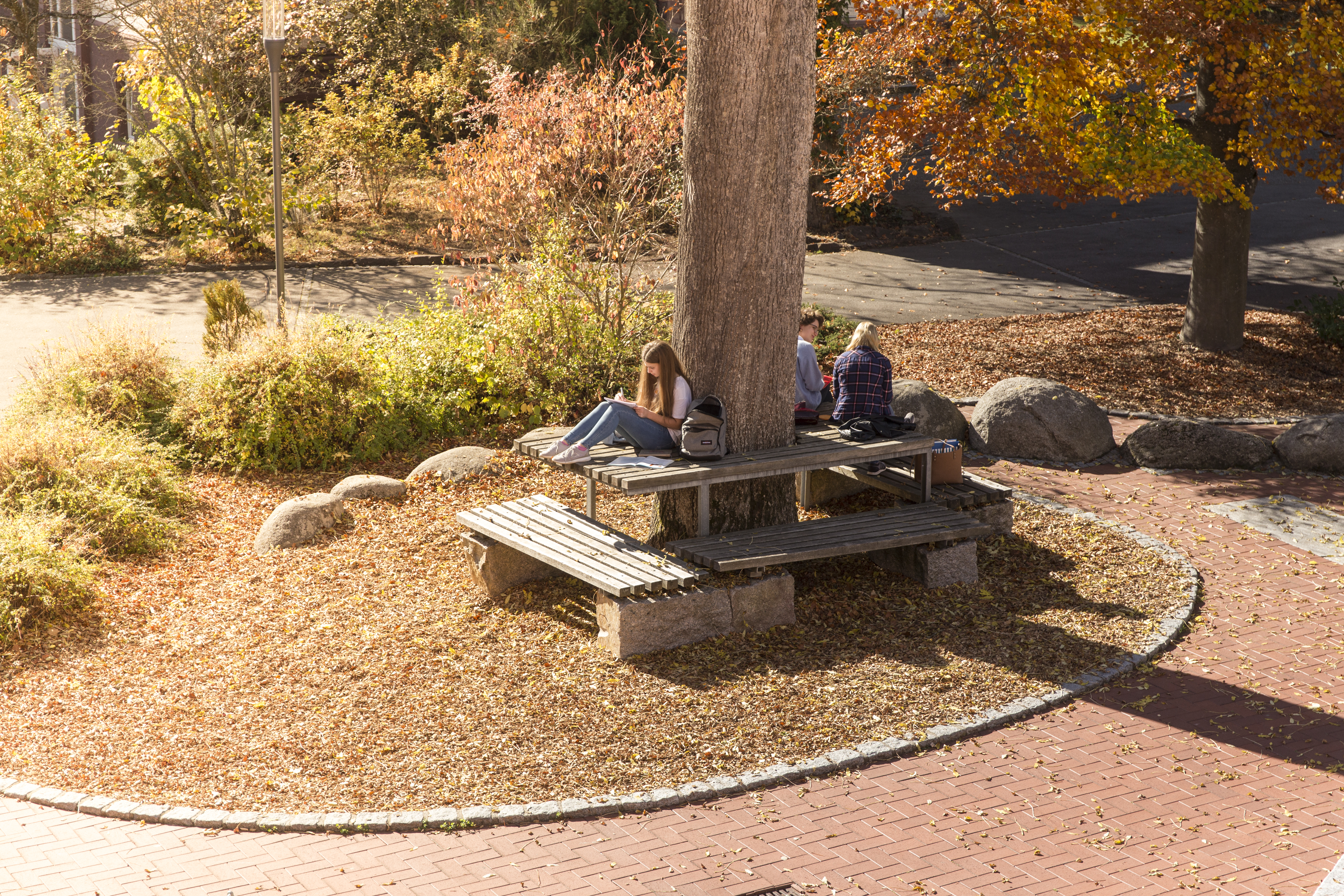 Schulhof